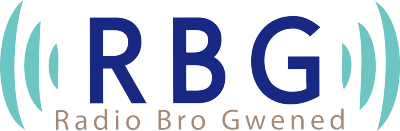 Logo de Radio Bro Gwened